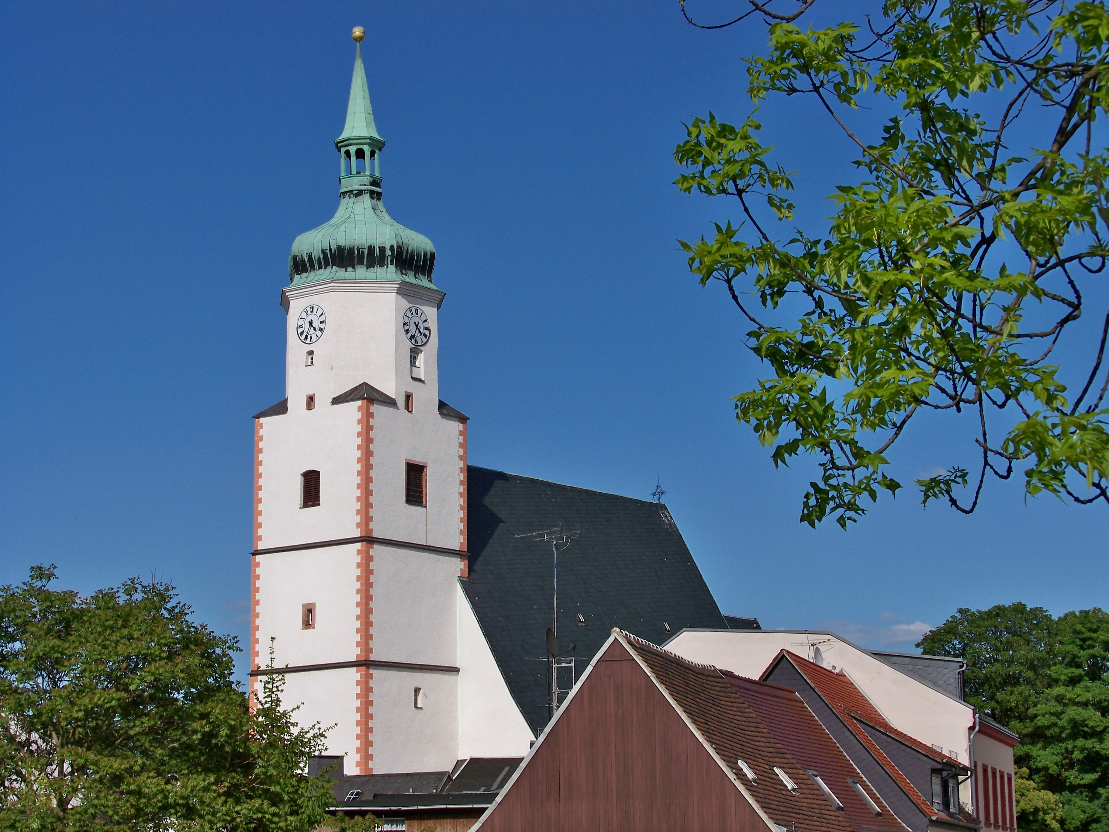 Wenceslaikirche in Wurzen